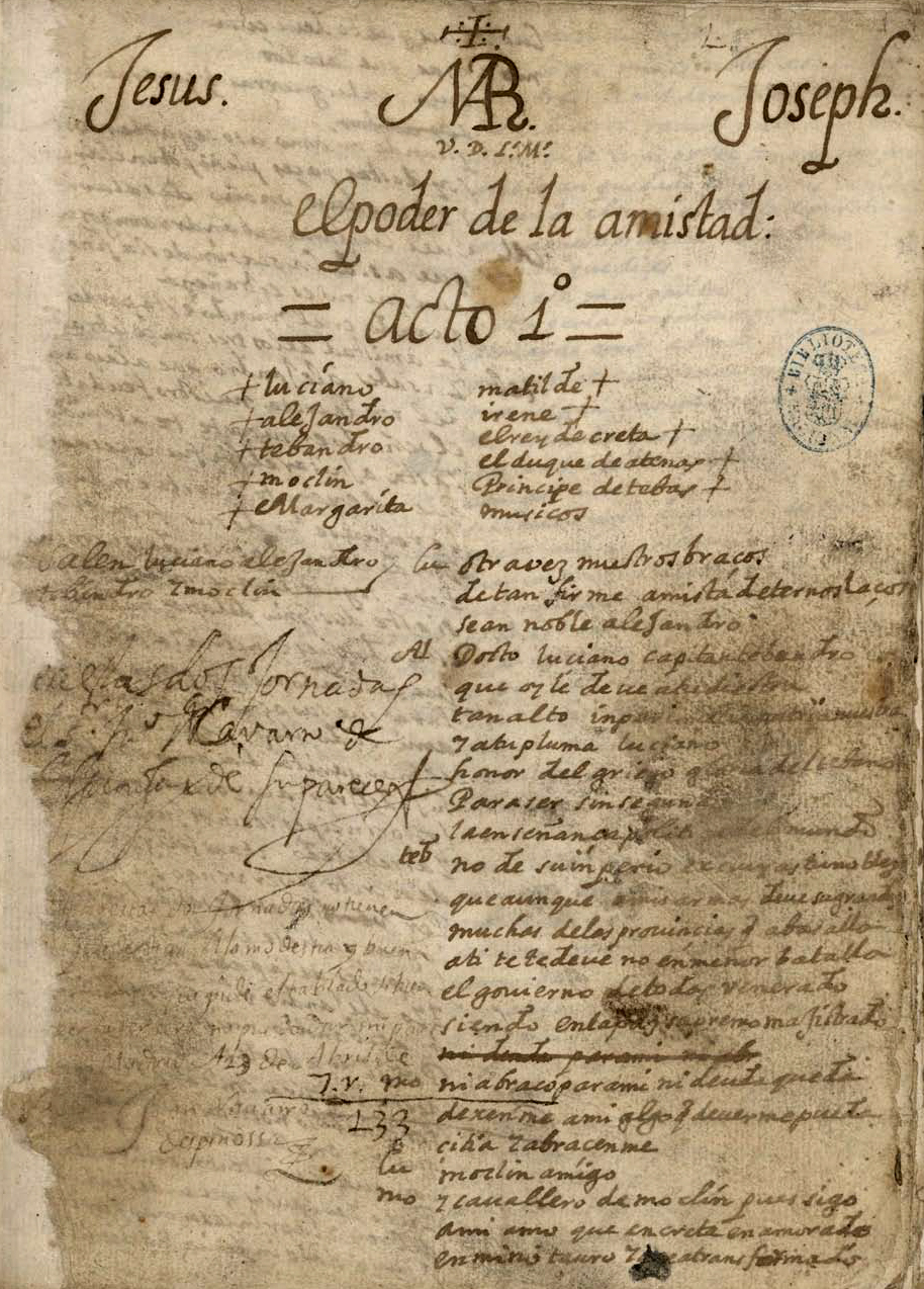 Íncipit de El poder de la amistad en un manuscrito autógrafo (excepto dos primeras hojas de la tercera jornada) de Agustín Moreto, firma y fecha a 25 de abril de 1652 (fol. 36r). BNE Signatura Vitr/7/4